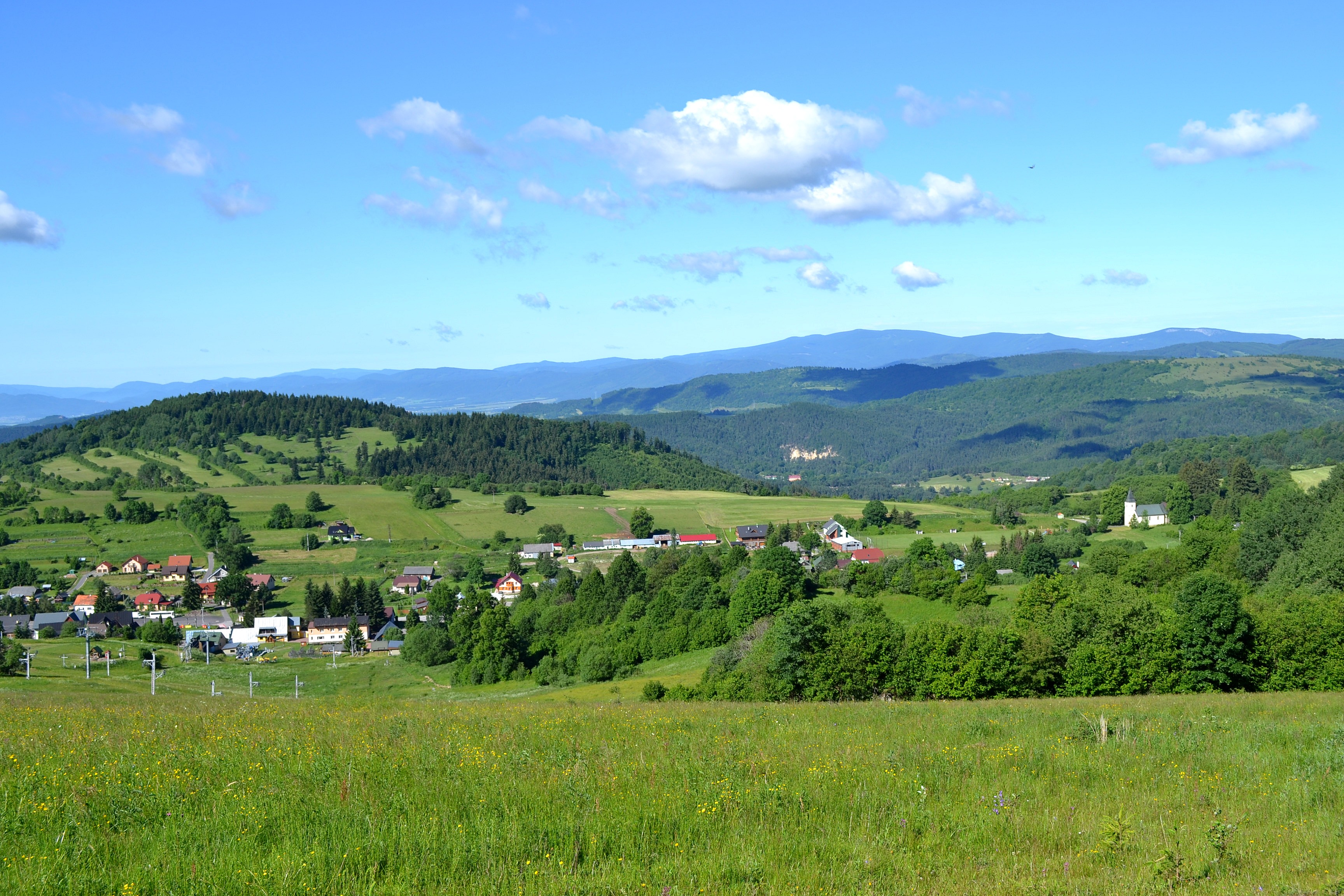 Krahule (okr. Žiar nad Hronom)